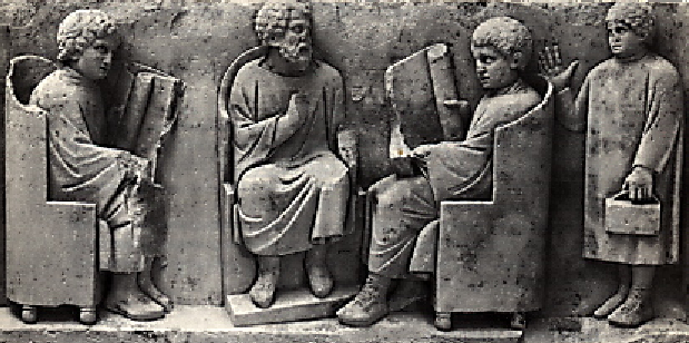 Grammaticus in de Romeinse tijd met zijn leerlingen. Een laatkomer steekt zijn hand op.